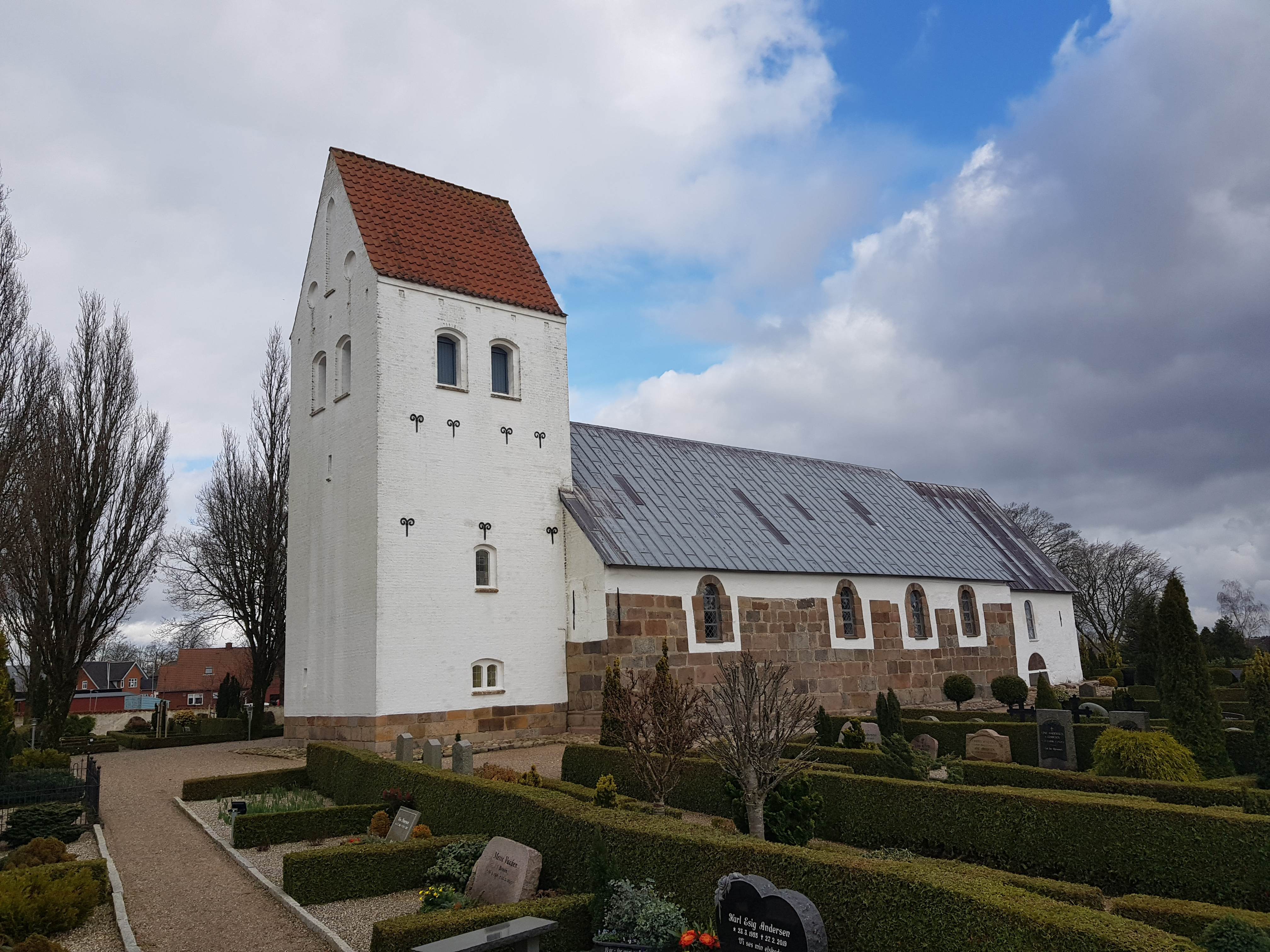 Bække Kirke